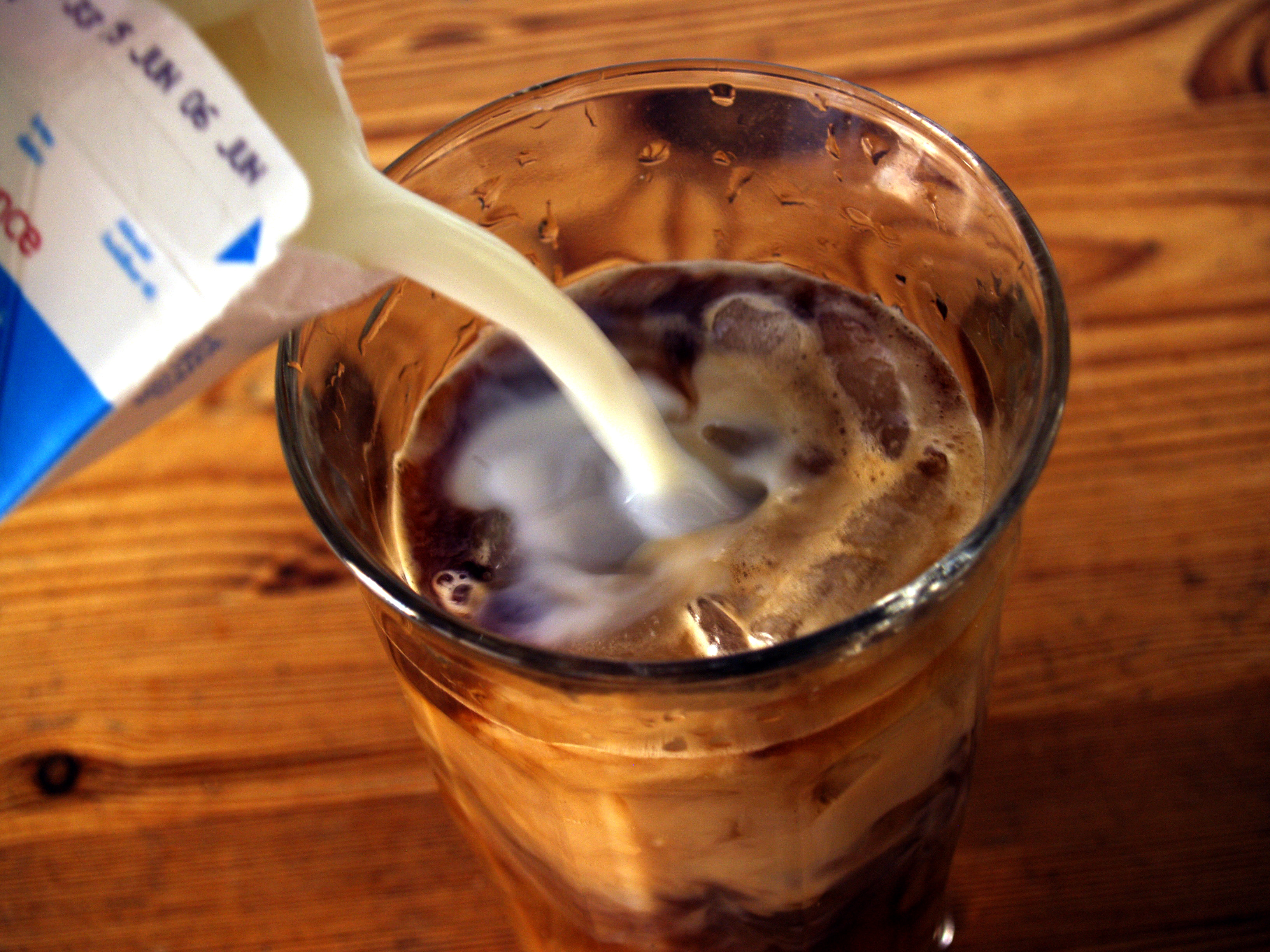 Iskaffe